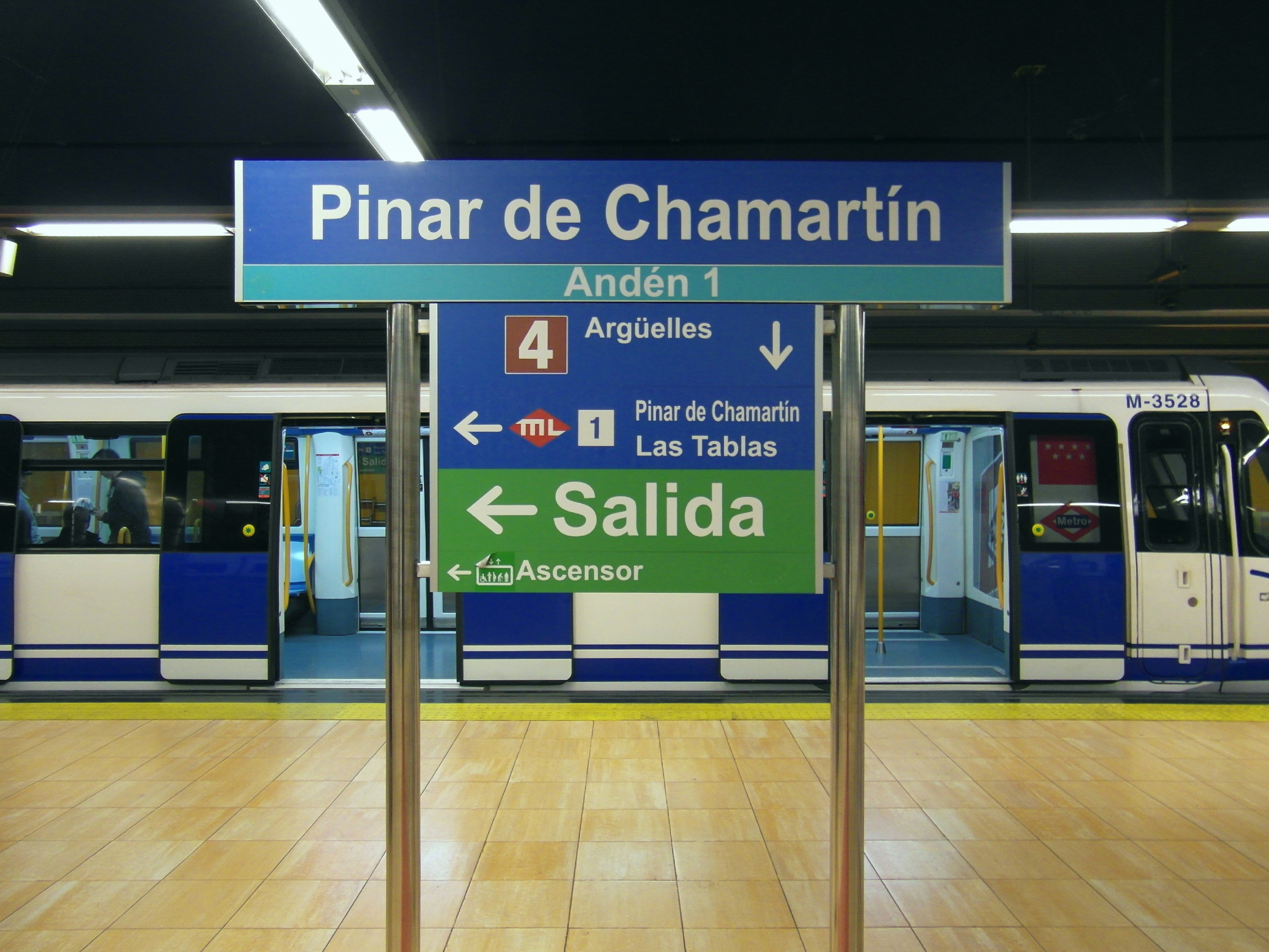 Madrid - Metro - Estación de Pinar de Chamartín